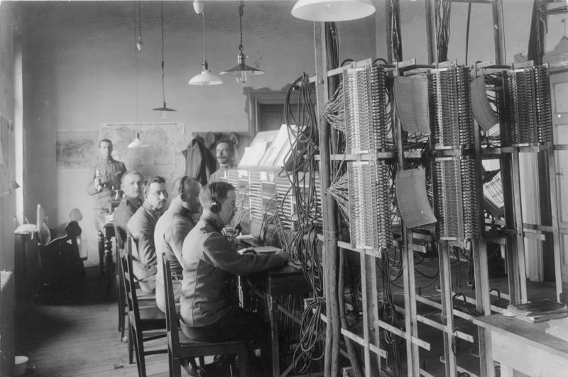 Fernsprechvermittlung beim Kommando